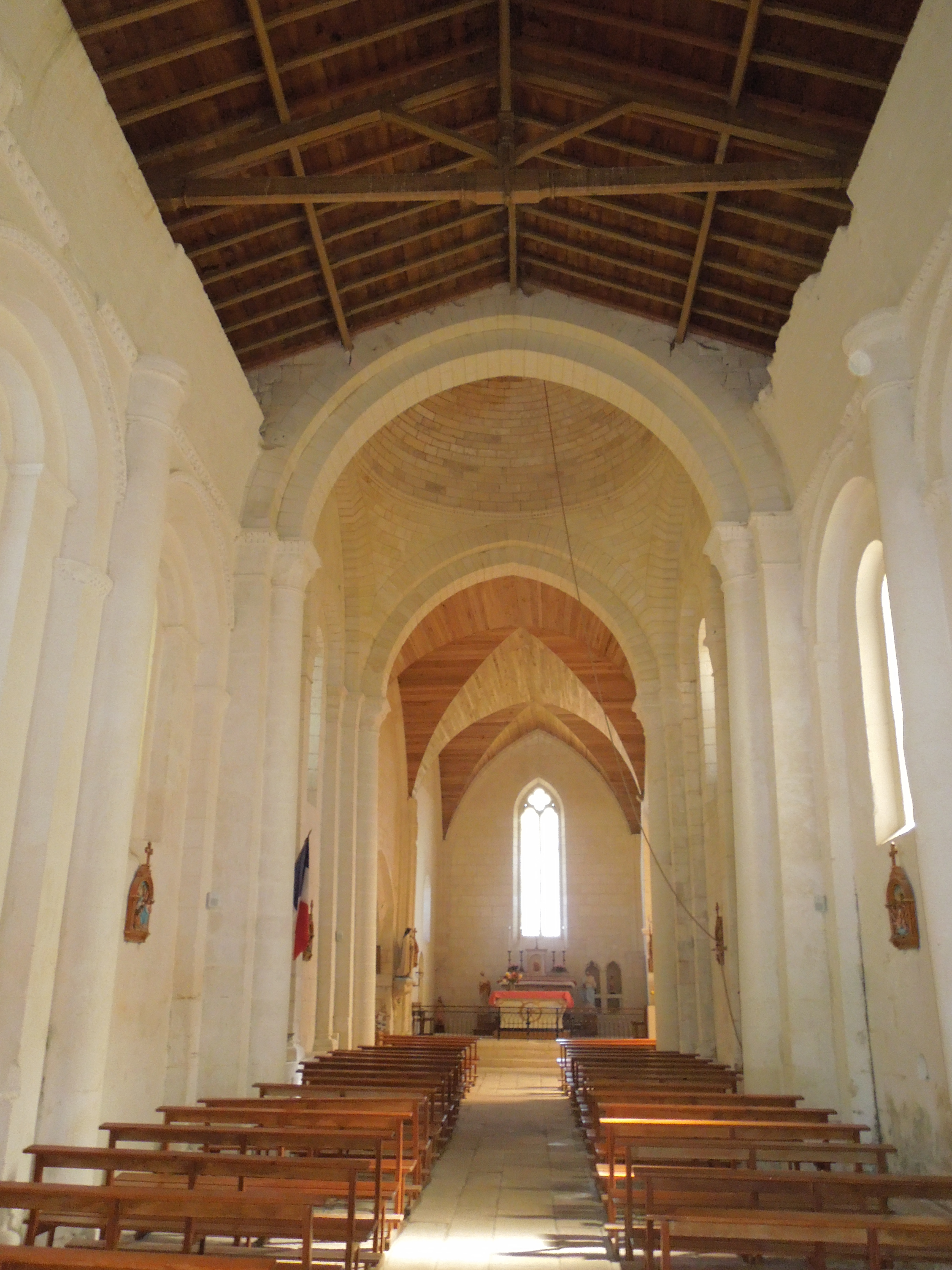 Innenansicht der katholischen Pfarrkirche Saint-Pierre in Échebrune